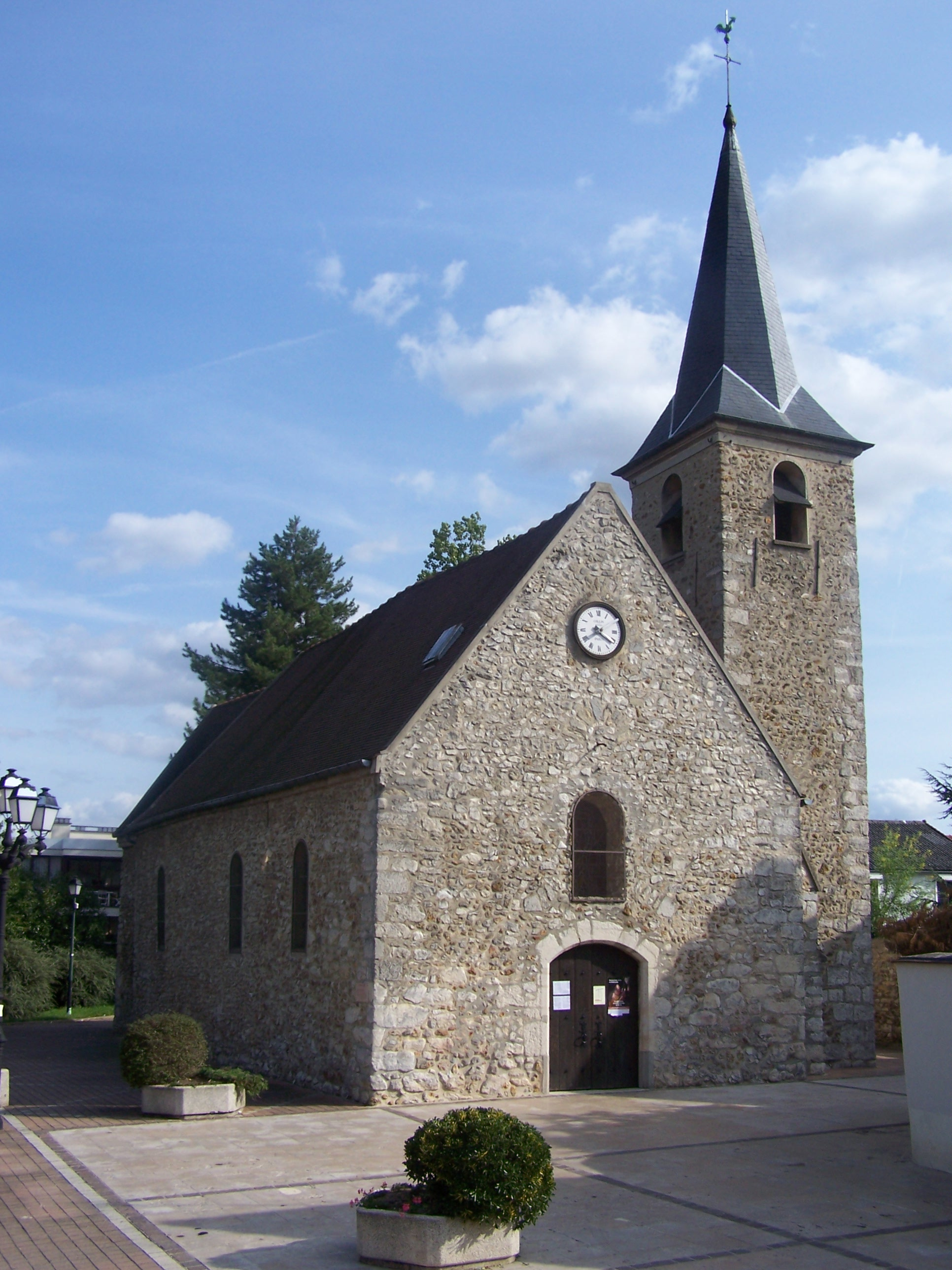 Église Saint-Germain de Fontenay-le Fleury (Yvelines, France)